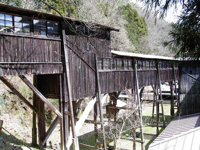 綾部市立旧奥上林小学校（廃校）の空中高架の木造渡り廊下